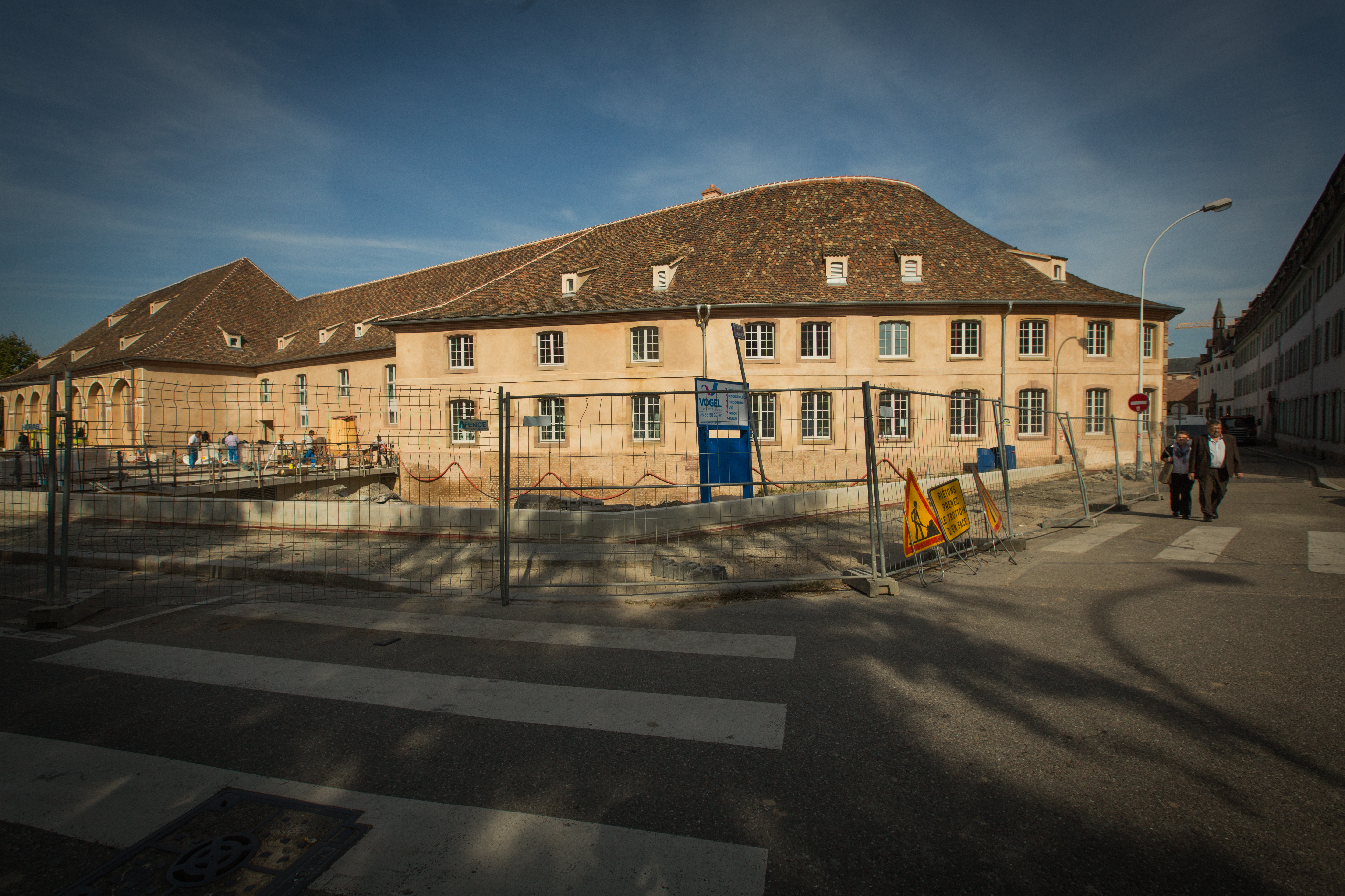 Strasbourg Haras national octobre 2013 01